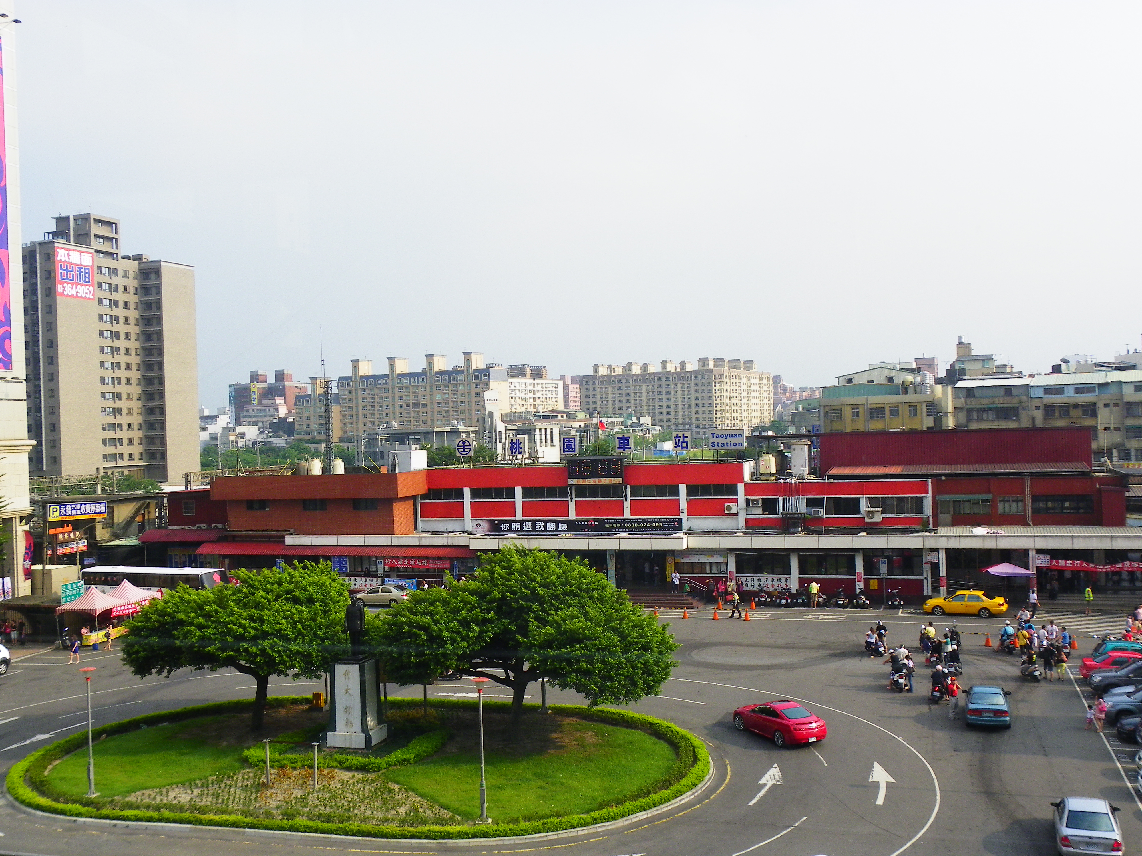 臺鐵桃園車站與站前廣場。